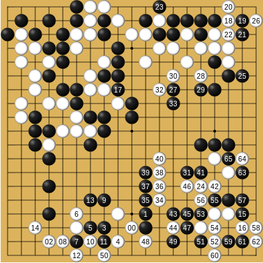 AlphaGo adimen artifizialeko programak Fan Hui Go jokalariaren aurka egin zuen 4. partiduaren (2015eko urriaren 8an) 2. zatia.